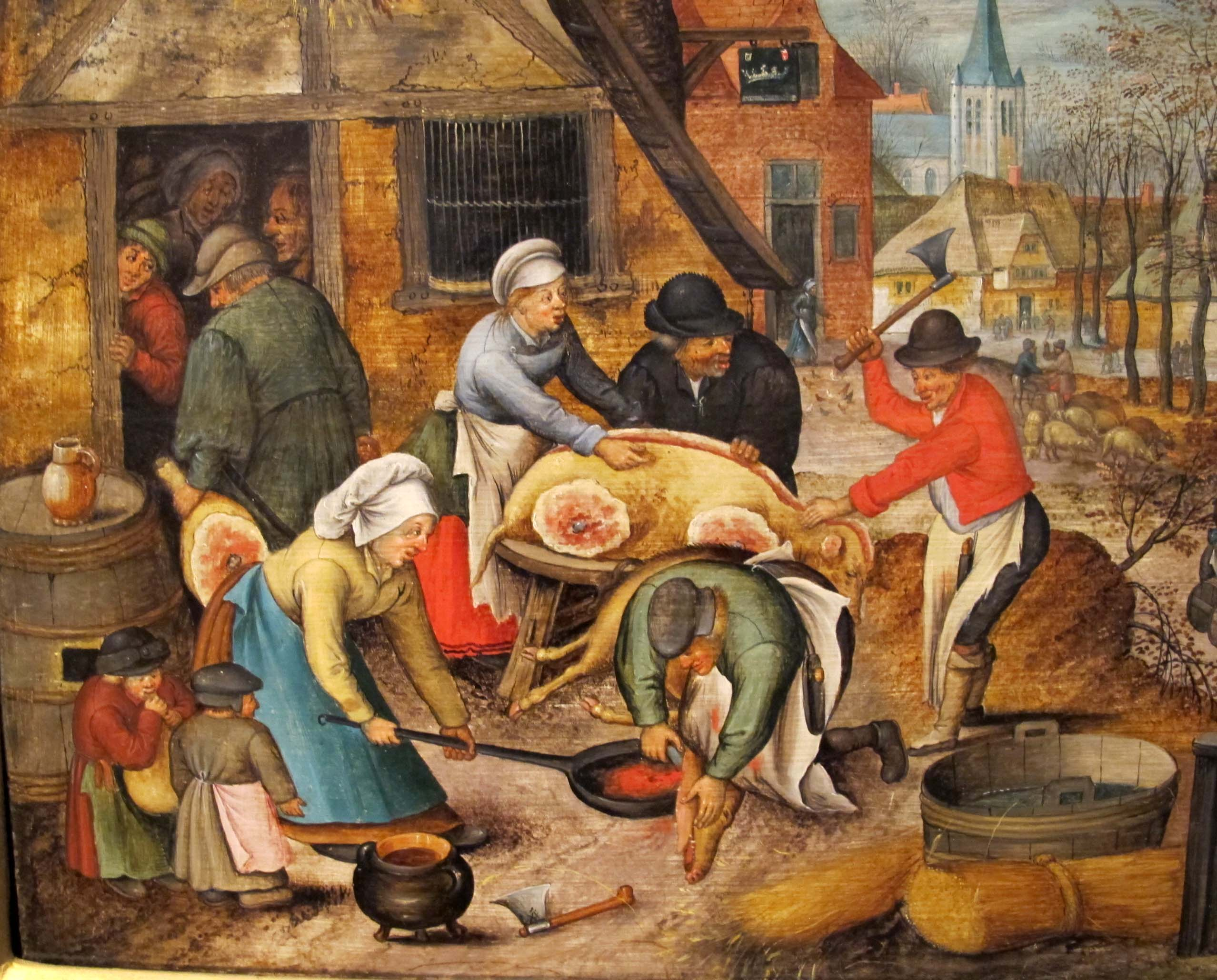 Pieter bruegel il giovane, autunno